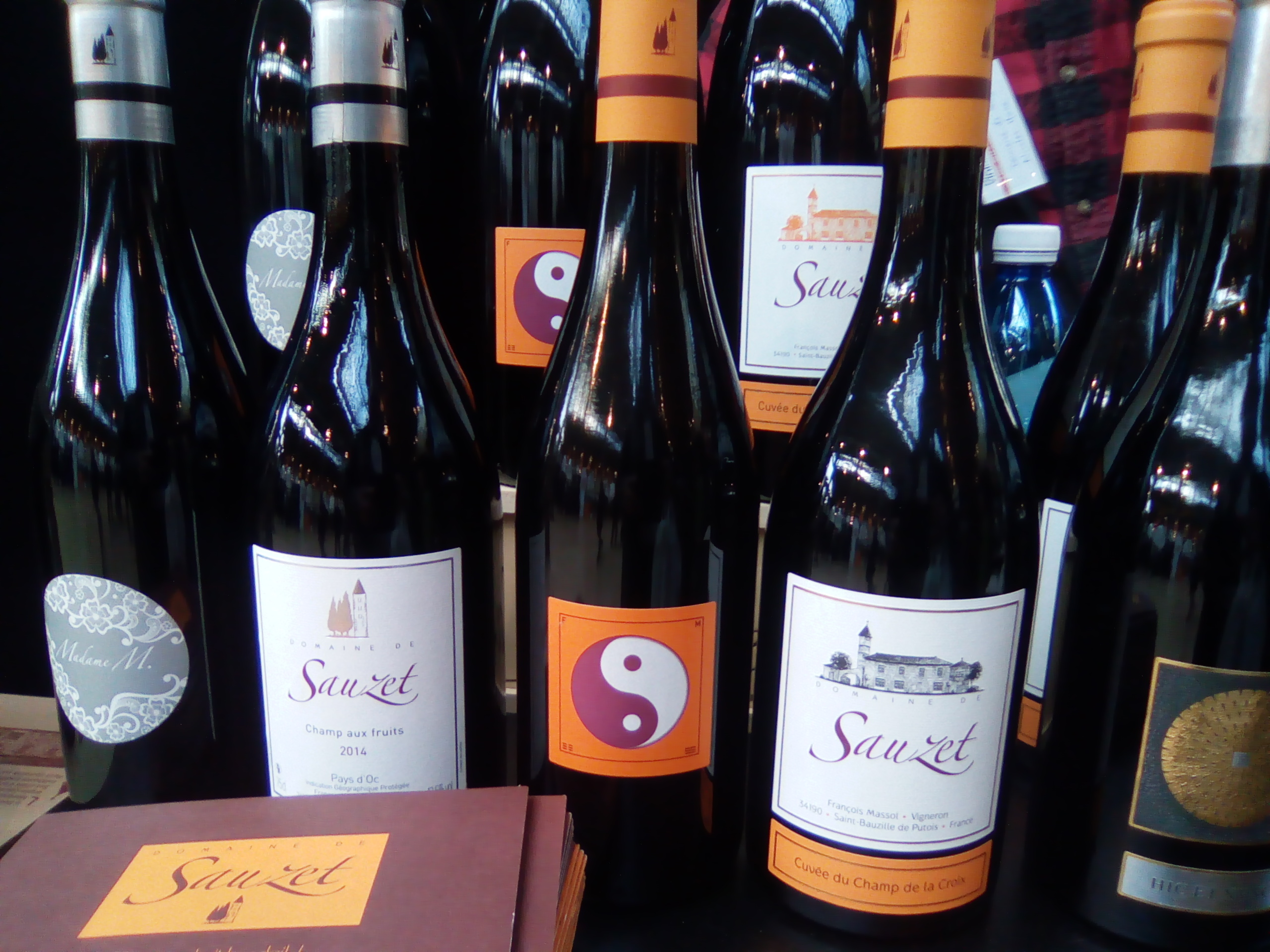 Salon vinibio.